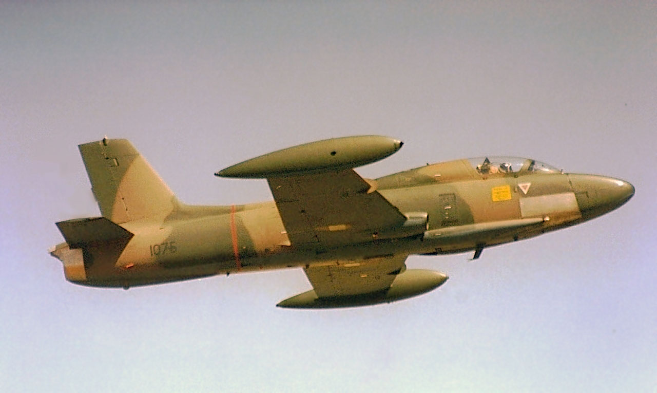 SAAF Impala MkII 1075